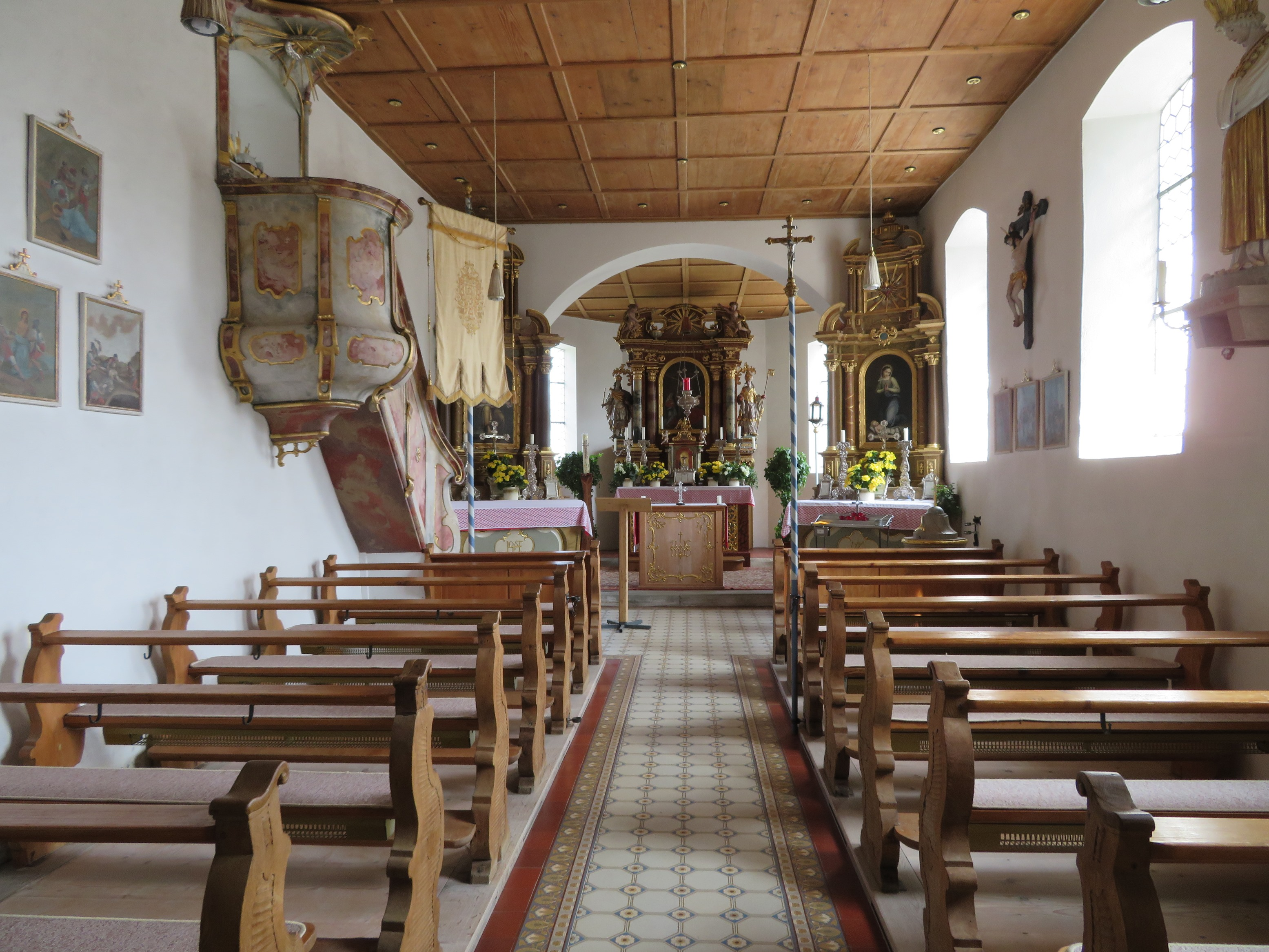 St. Oswald in Knottenried (Diepolz)